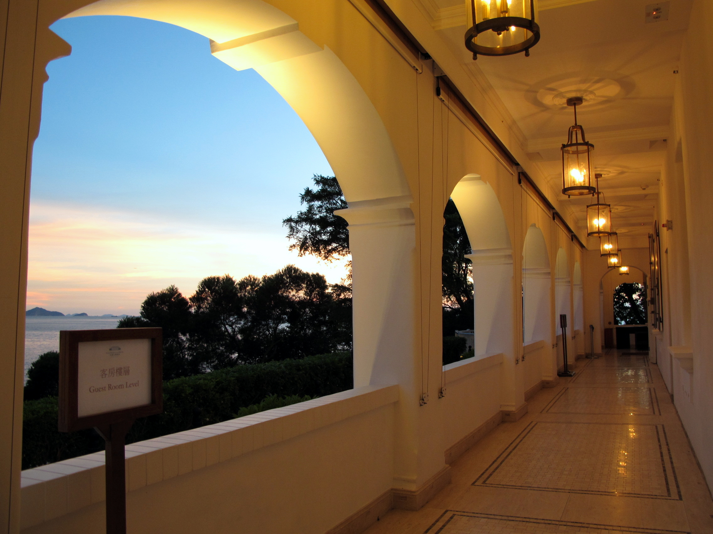 Tai O Heritage Hotel